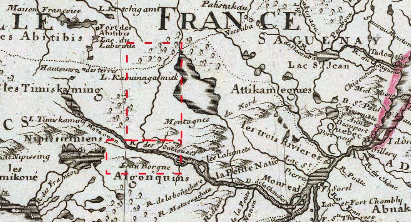 Extrait de la carte de 1703 de Guillaume de l'Isle montrant la rivière Dumoine (Aginagwasi sipi,)